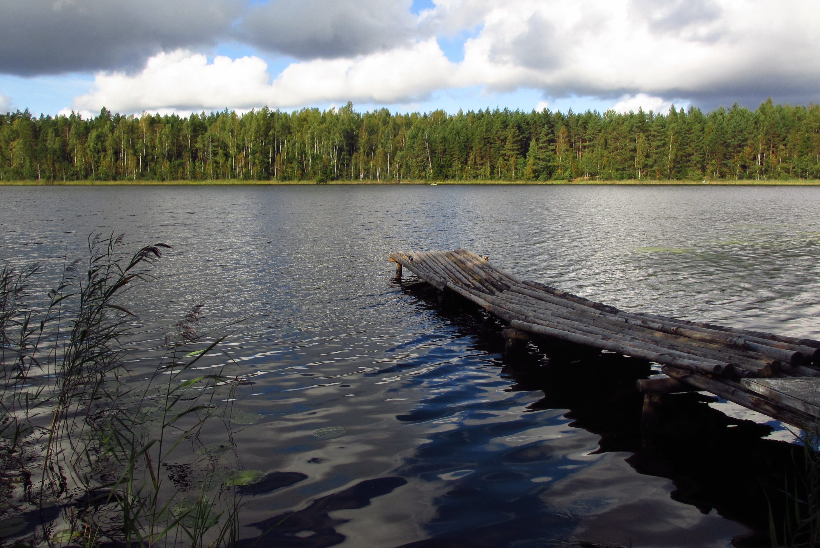 Kurtna Aknajärve lõunakaldal Kurtna MKAl